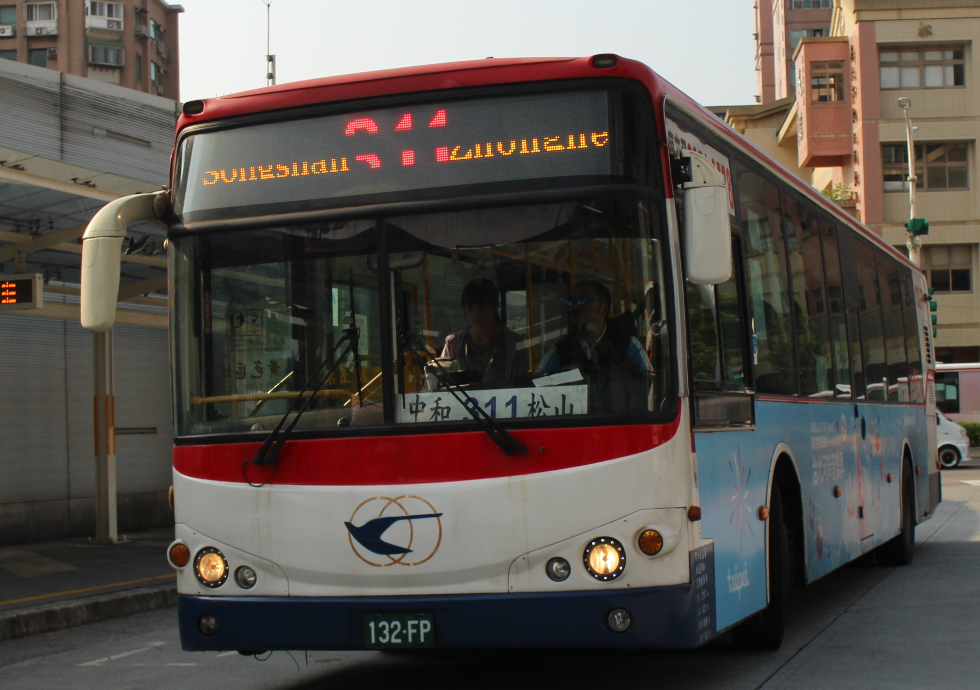 中興巴士 2009 KINGLONG KL6120U1四期 132-FP 311